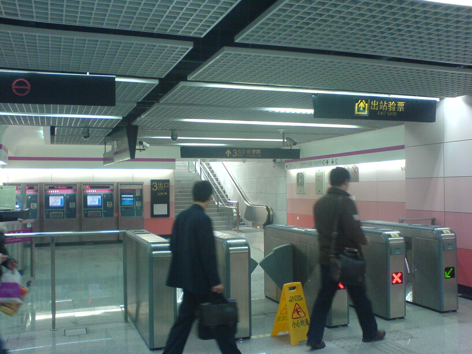 灵岩南路站站台